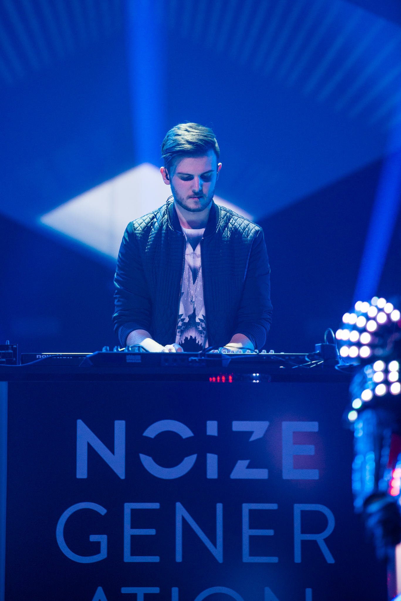 'Eurovision Song Contest 2015 - Unser Song für Österreich': 'Noize Generation'